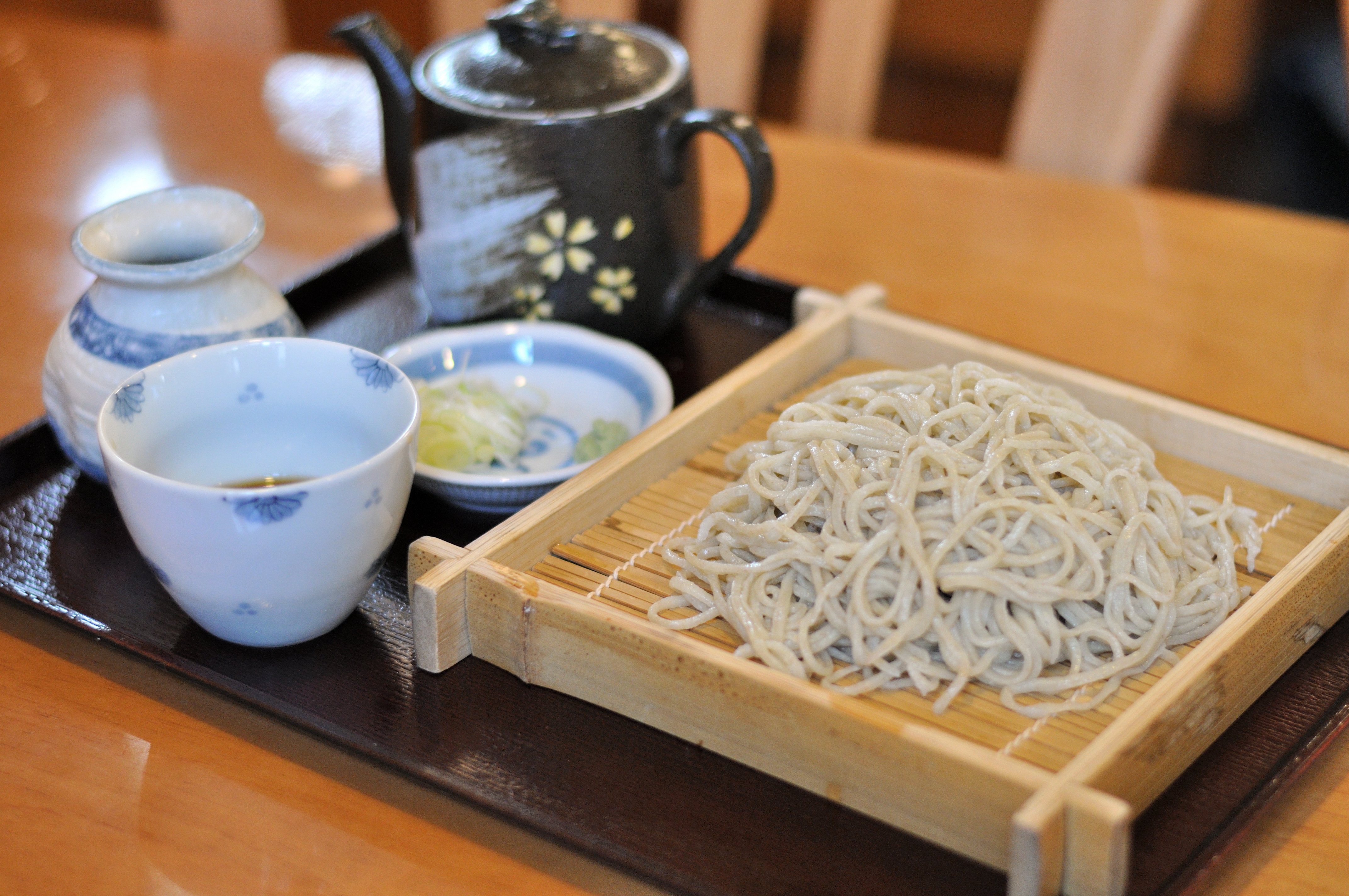 典型的なもり蕎麦の参考画像 さいたま市見沼区「小麦屋」のもりそば Nikon D5000